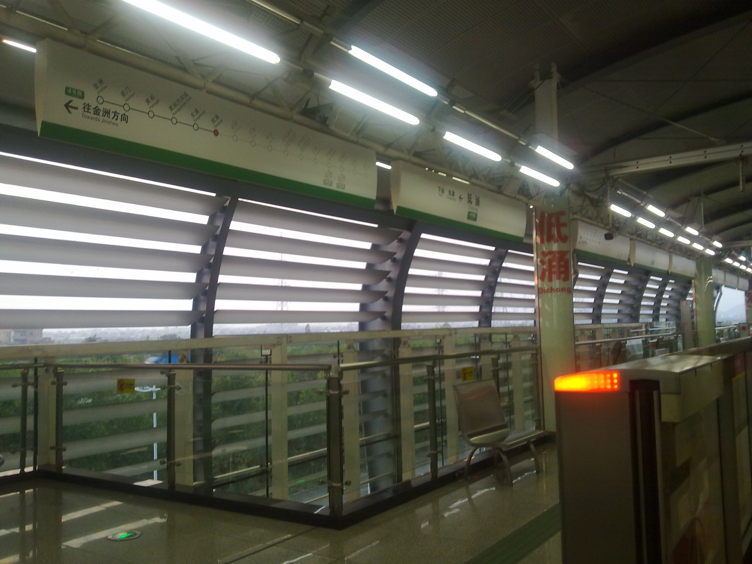 廣州地鐵低涌站站台